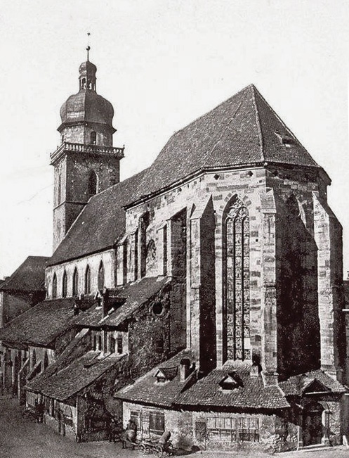 Temple protestant allemand (ancienne église Saint-Etienne) démoli en 1858. Bibliothèque nationale et universitaire de Strasbourg